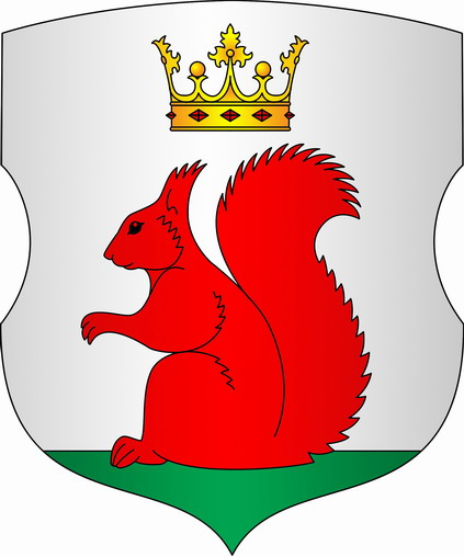 Herb miasta Brzostowica Wielka